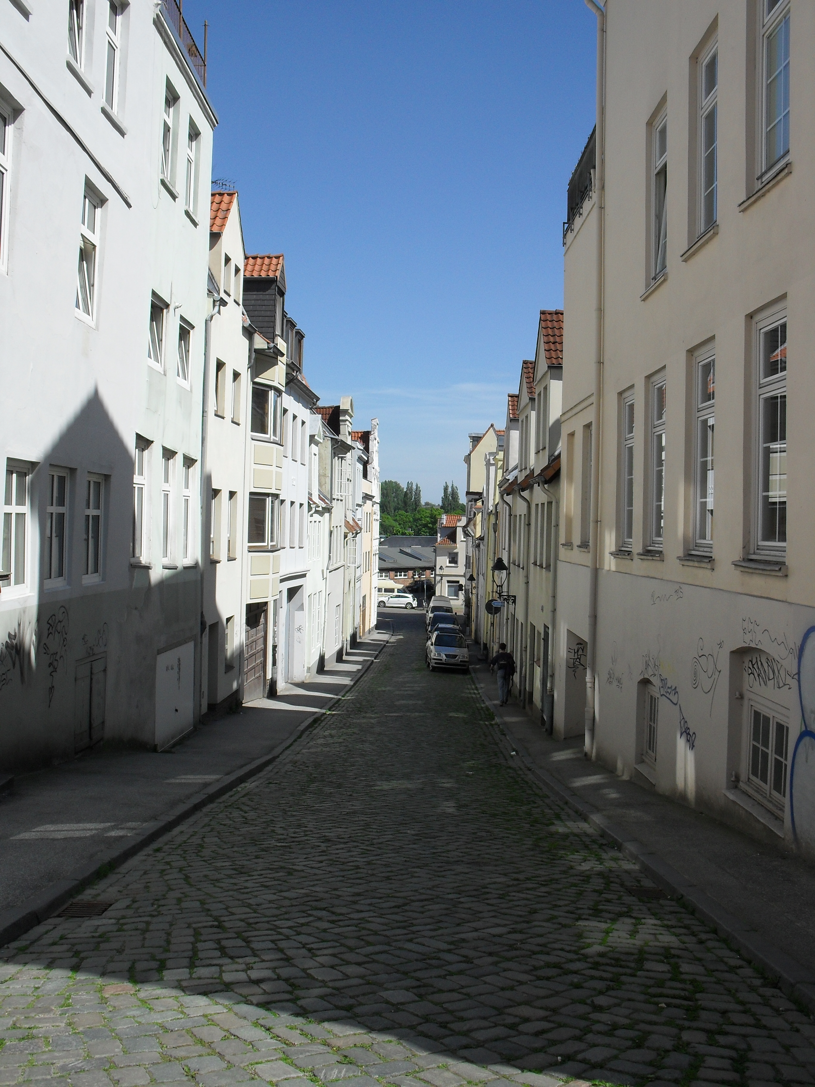 Die Kleine Gröpelgrube in Lübeck